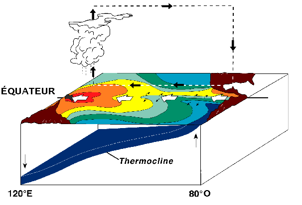 Le renforcement des alizés augmente la circulation de Walker et la déplace vers l'Ouest tout en la renforçant.